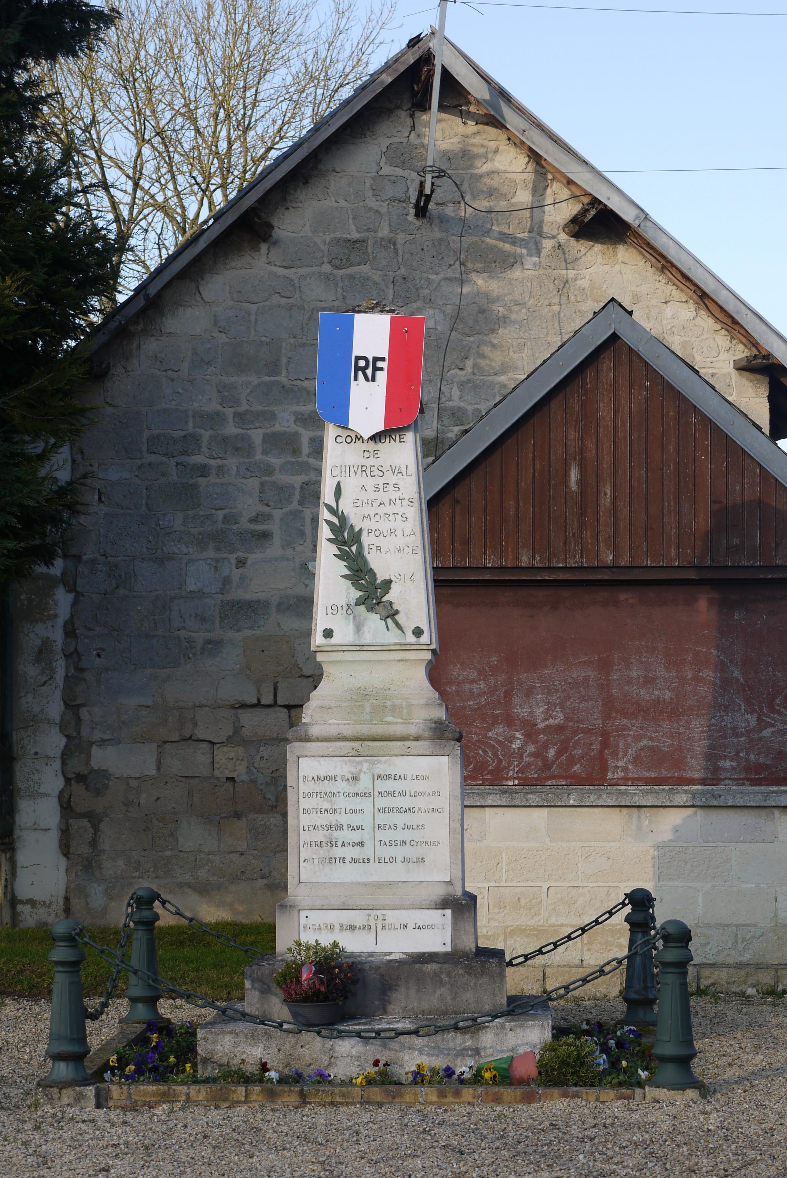 Monument aux morts de Chivres-Val.